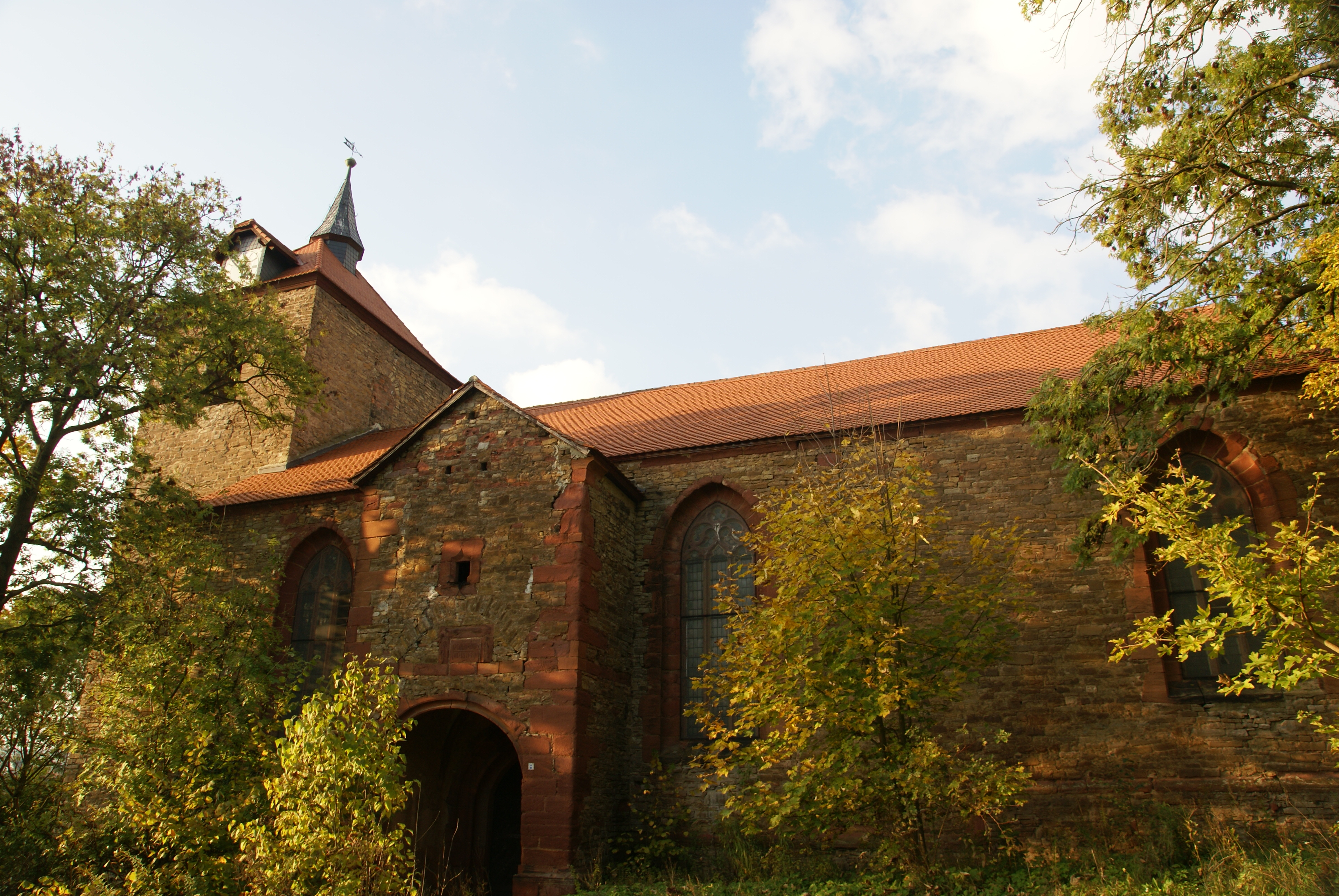 die evangelische Kirche St. Ägidius in Hergisdorf